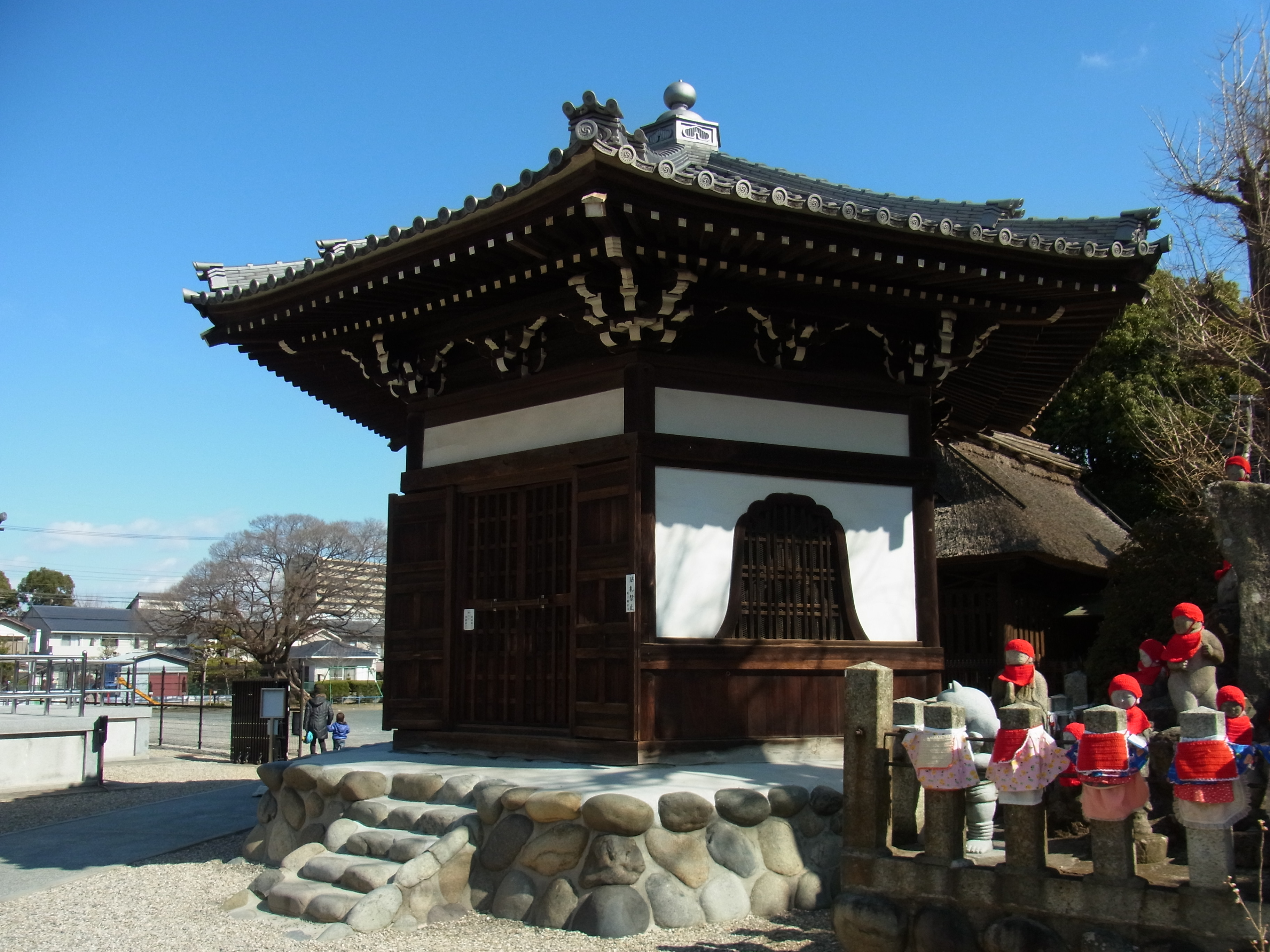 荒子観音六角堂